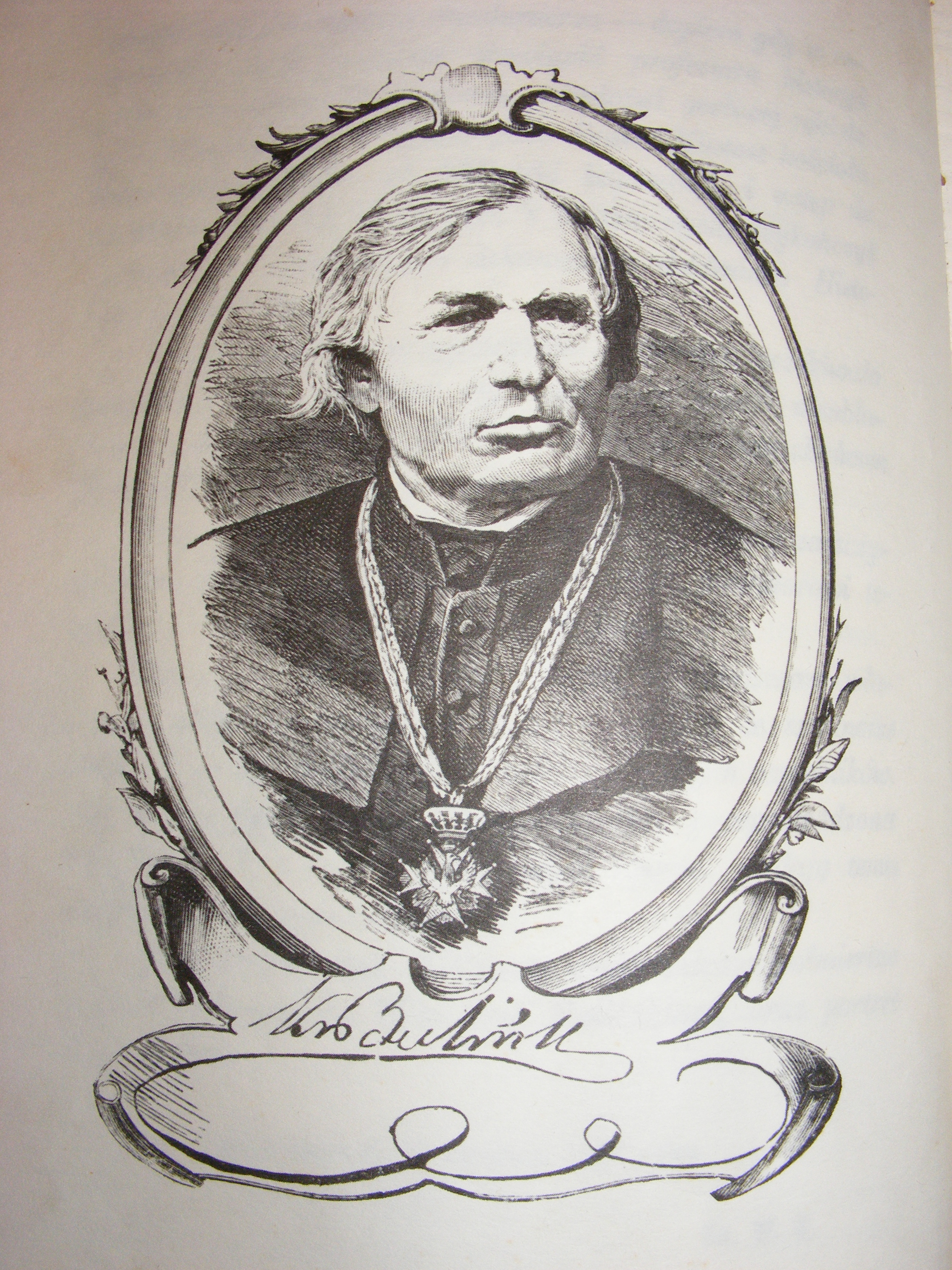 Ks. Melchior Buliński, rycina